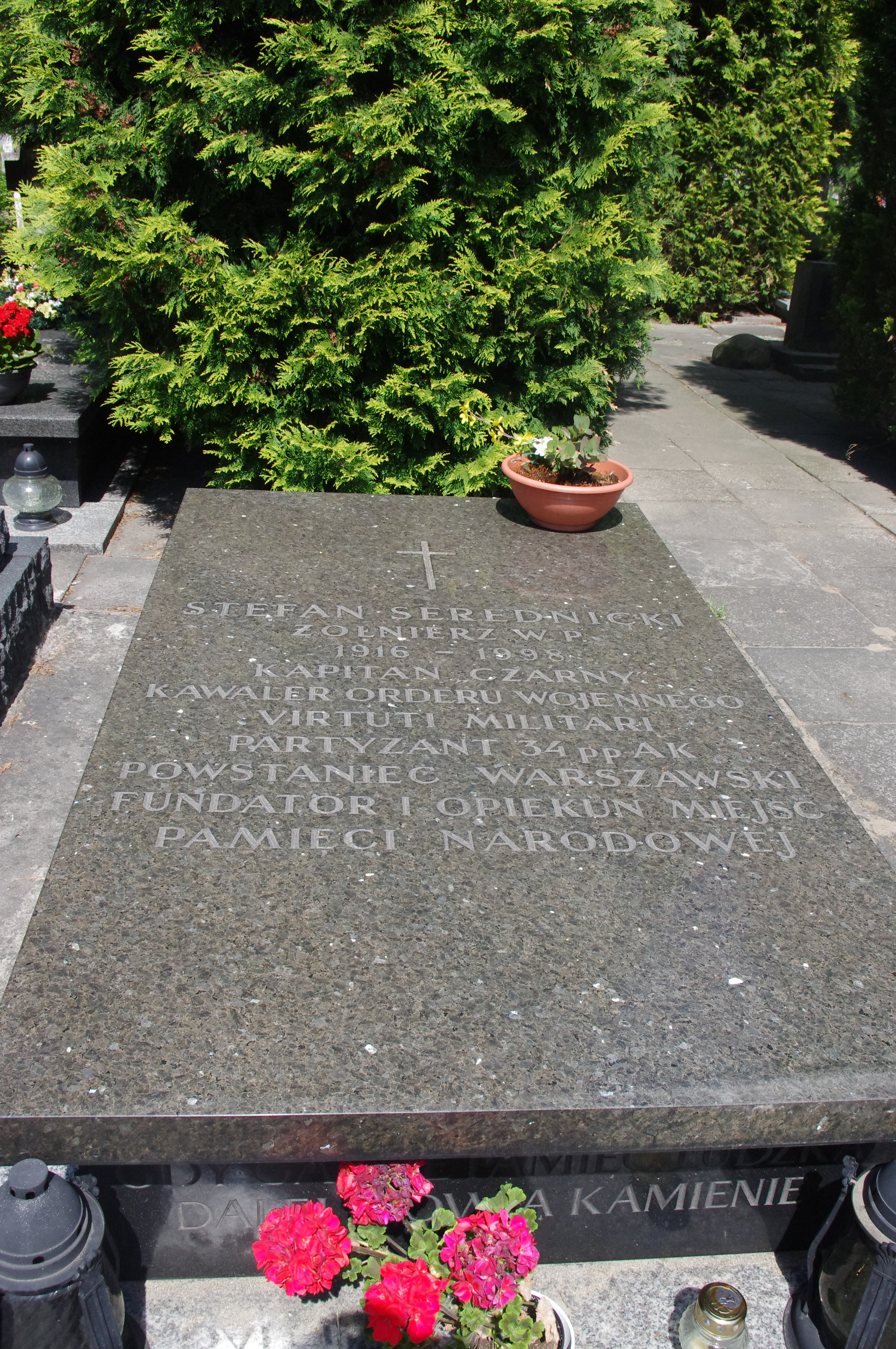 Grób kapitana WP - Stefana Serednickiego - kawalera Virtuti Militari, partyzanta 36 pp. AK na Cmentarzu Wojskowym na Powązkach